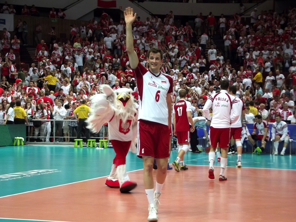 Zdjęcie zrobione podczas meczu Polska - USA siatkarskiej Ligii Światowej w katowickim Spodku.